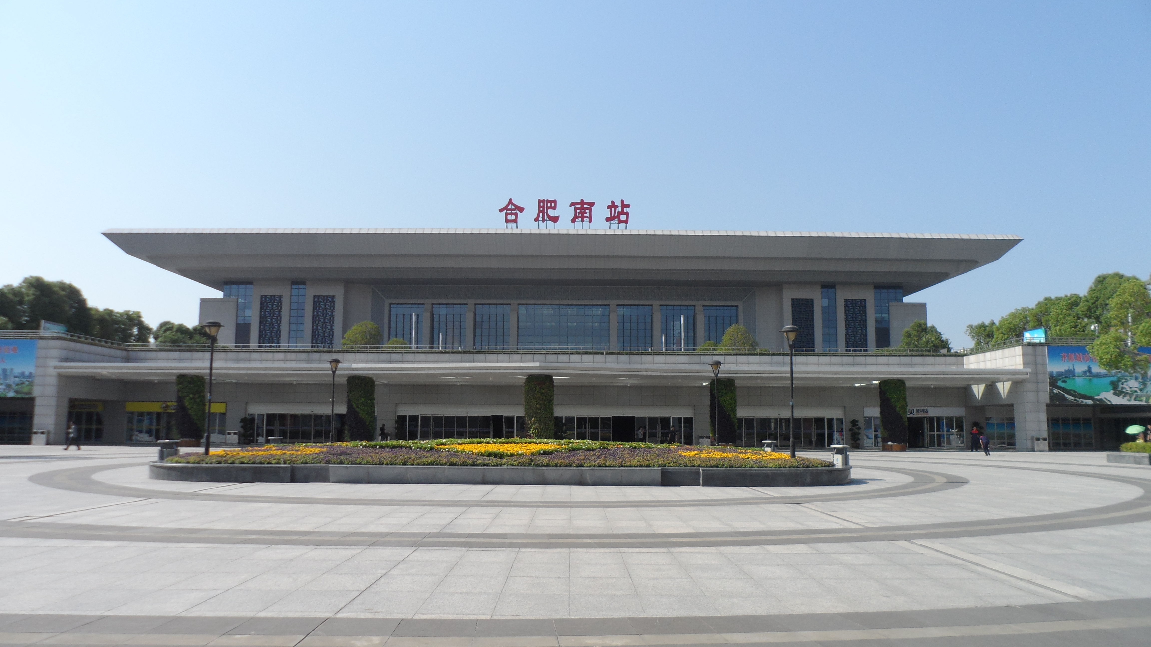 Hefei Railway South Station